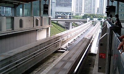 多摩センターの様子